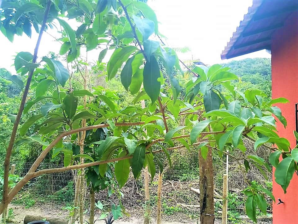 Galho com folhas de Dyssochroma viridiflora